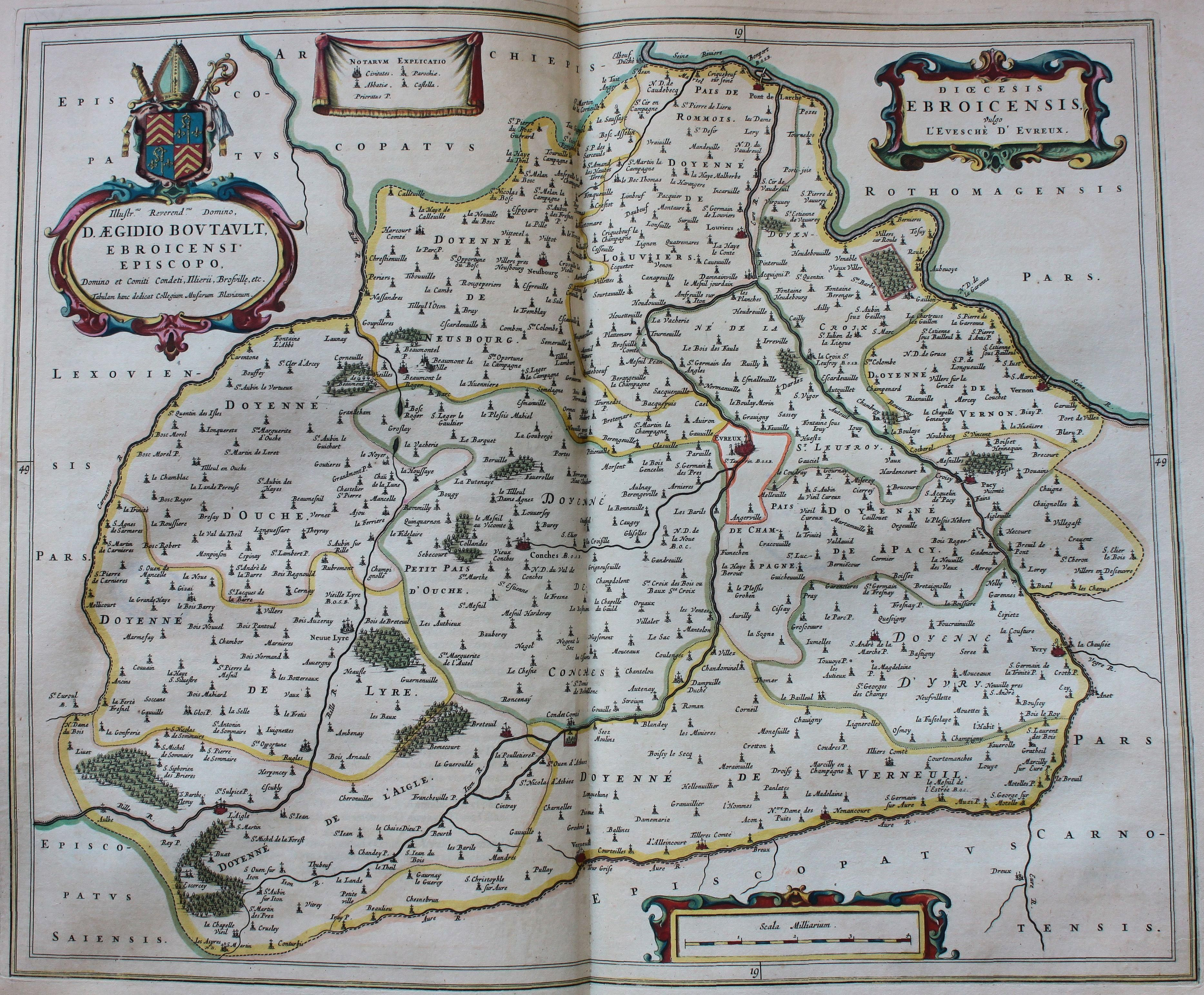 Descripción bibliográfica: Geographia Blaviana. - [Amsterdam : Juan Blaeu, 1659] . - [32], VI, 96 p., 34 f., h. 35a, 35b, 35c, 35d, 36-44 f., 34, [2], 36-40, [2], 43-70 [i. e. 75], [1] f., [20] p. de map., [9] f. de map., [4] f. pleg. de map., [2] f. de plan., [2] f. ge grab. : |bil. ; |cFol. marca major (57 cm.) . - En la dedicatoria a Felipe IV: "Presenta ... El Atlas Universal y Cosmographico de los orbes y terrestre ... Juan Blaeu" . - Título tomado del frontispicio. -- Privilegio fechado en 1659. -Errores de pag. - Sign.: 1, *2, **3, ***-****2, a-e2, A-I2, K1, L-Z2, Aa-Dd2, 4 2, Ee-Ff2, A-I2, K1, L2, M1, N-Y2, Z5, Aa-Dd2, Ee1, A-D2, E-F1, G-I2, K-L1, M-O2, P1, Q-Z2, Aa-Bb2, Cc1, Dd3, Ff-Zz2, Aaa-Bbb2, . - Frontispicio grab. col. -- Incluye un total de 49 il. entre map., plan. i grab. Materia: Atlas - Obras anteriores a 1800 Impresor: Blaeu, Joan, 1596-1673, imp. Lugar de impresión: Holanda. Amsterdam Localización: Vea la ilustración en su contexto Visite también la exposición "Cartografía histórica en la Biblioteca de la Universidad de Sevilla"